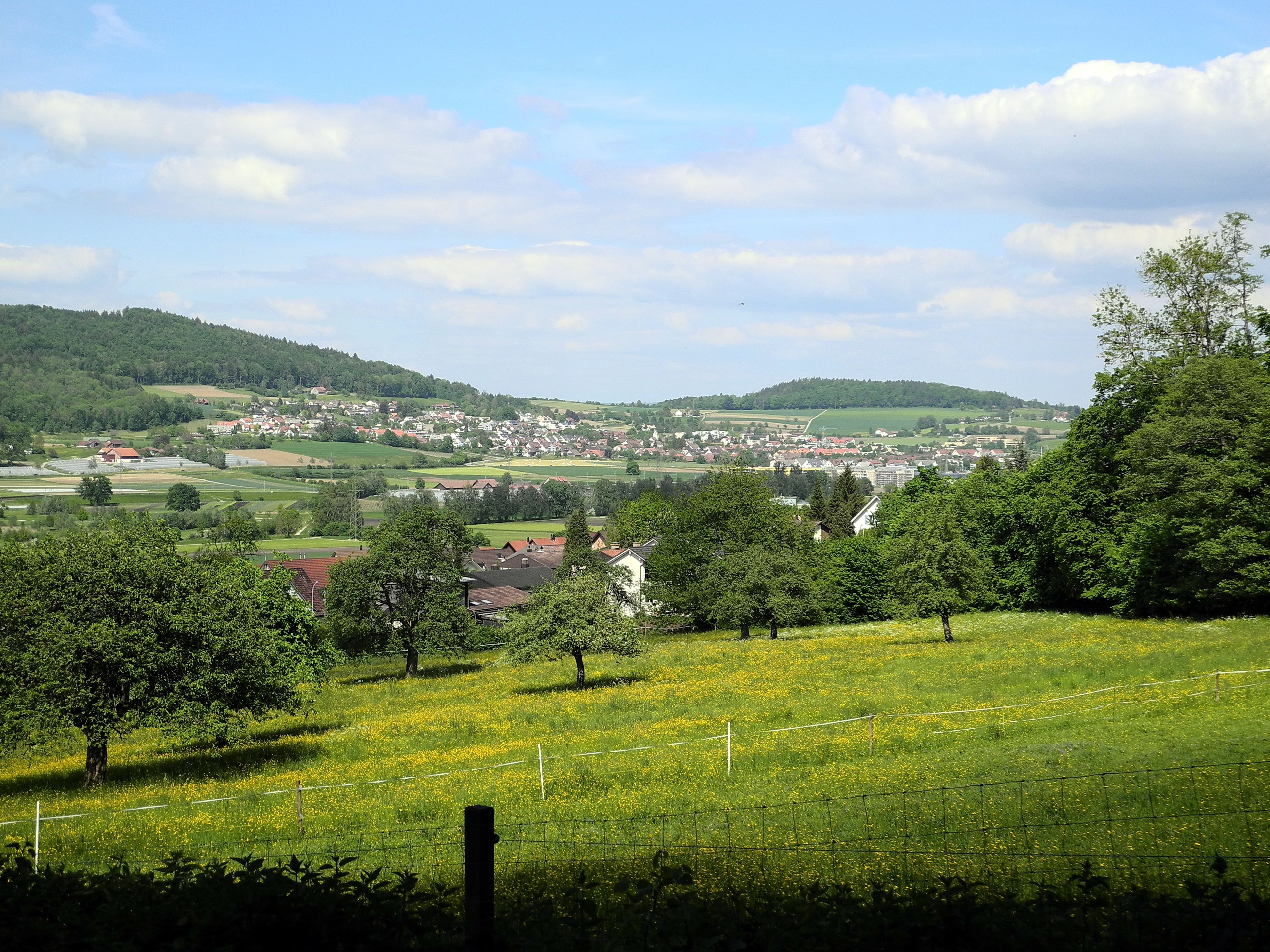 Buchs, Lägern, Dänikon (Switzerland)